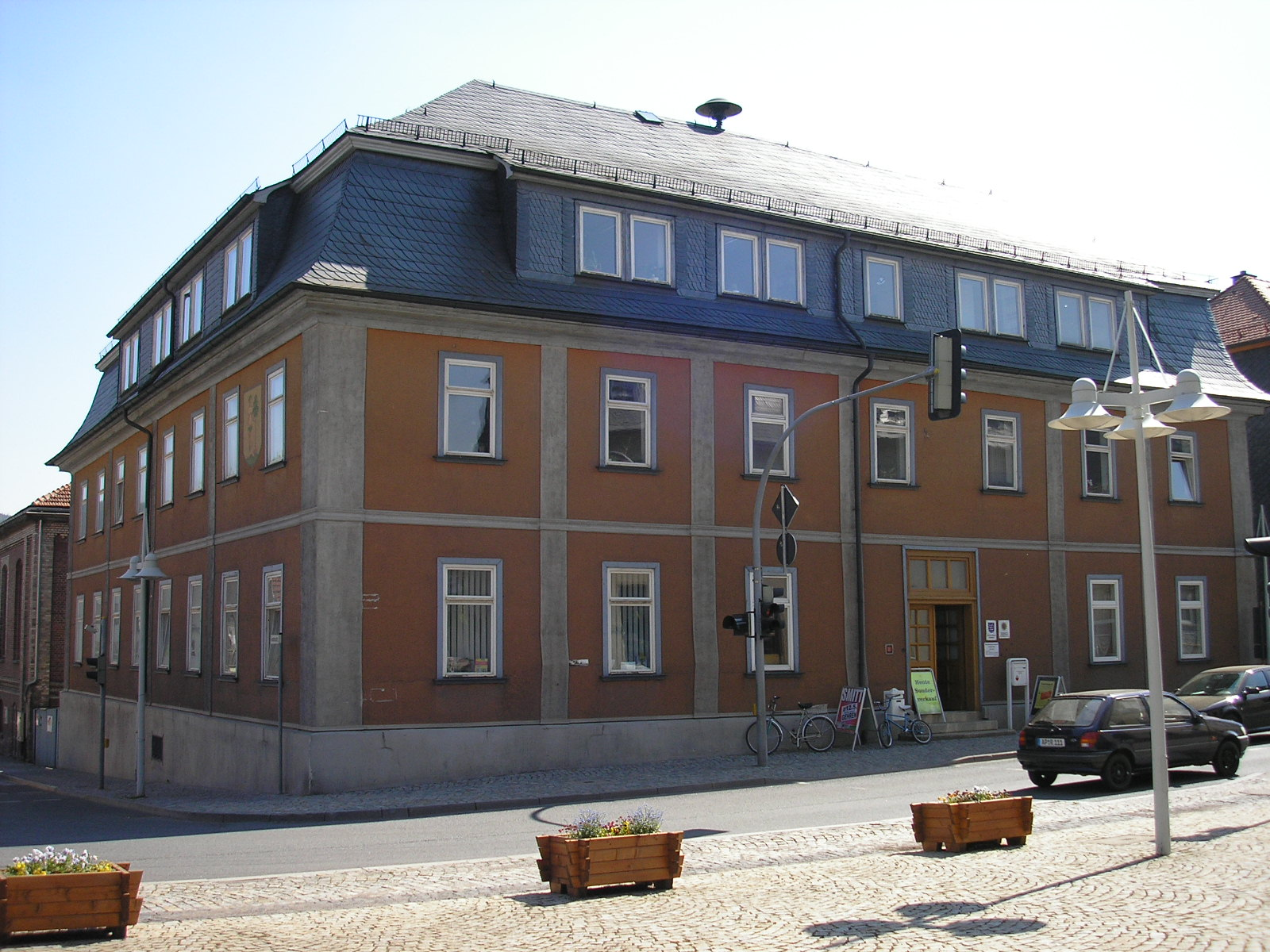 Rathaus von Gehren (Thüringen).Siehe auch: Image:Rathaus_Gehren_2009.JPG (nach der Sanierung)